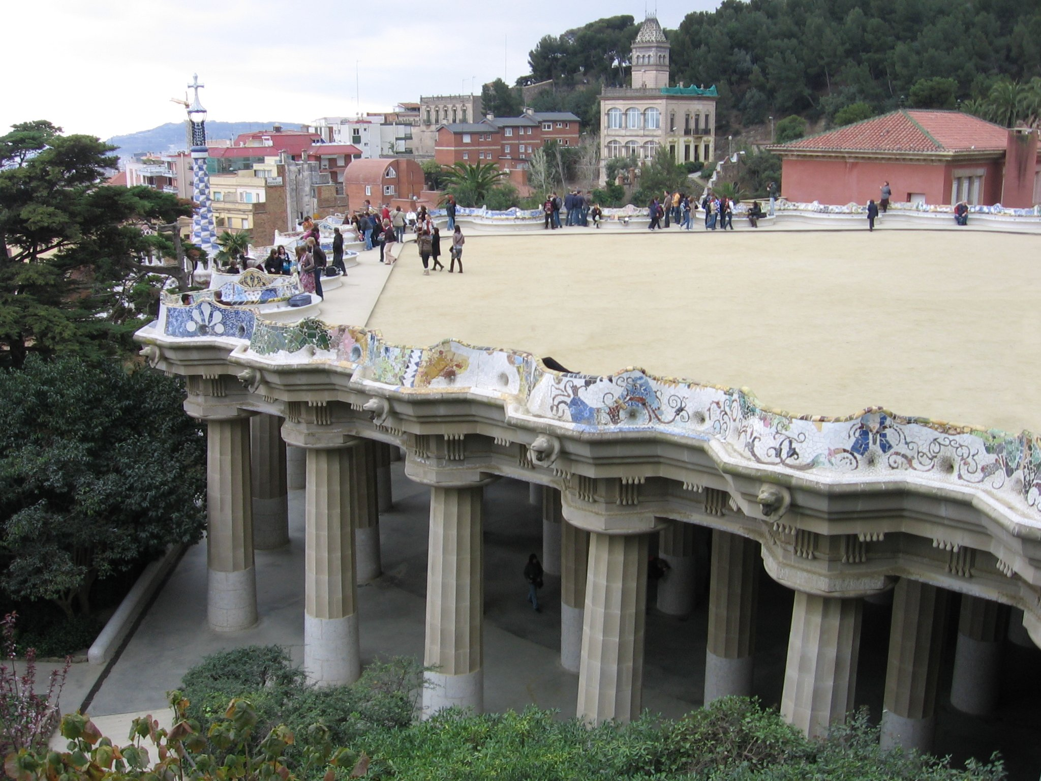 Parque Güell (Barcelona), de Antoni Gaudí